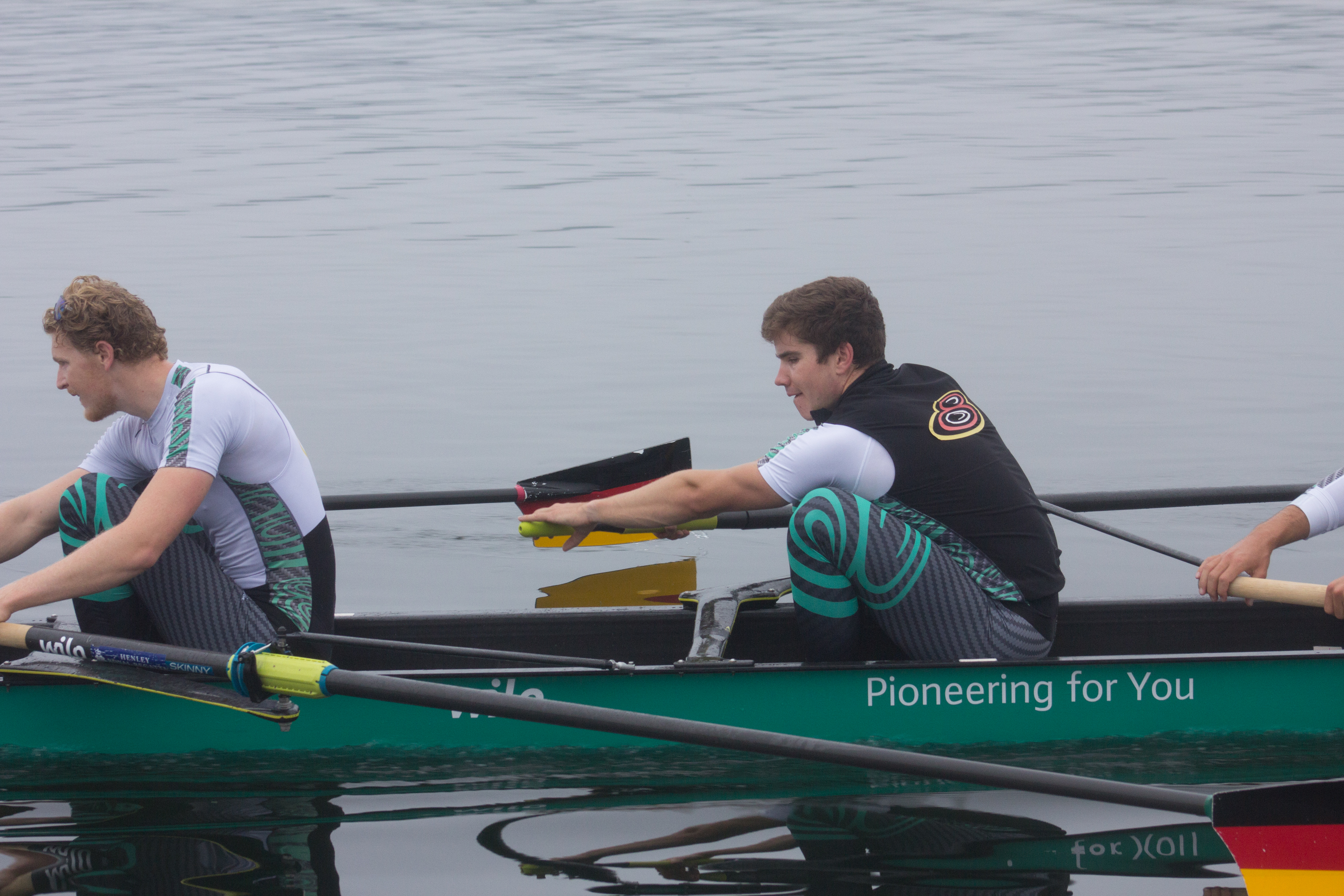 Medientag des Ruderverbandes in der Ruderakademie Ratzeburg am 6. September 2017: Deutschland-Achter im Training auf dem Ratzeburger See in der Besetzung: Johannes Weißenfeld, Felix Wimberger, Maximilian Planer, Torben Johannesen, Jakob Schneider, Malte Jakschik, Richard Schmidt, Hannes Ocik, Martin Sauer